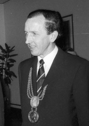 im Ratssaal. Auf der Feierstunde wurde der Abschlussbericht der Jubiläumsspende vorgestellt. Es kammen 354 Spenden mit einer Höhe von über 4 Millionen DM zusammen. Ministerpräsident Gerhard Stoltenberg (Bildmitte) begrüßt Landtagspräsident Helmut Lemke (links), daneben der Universitätpräsident Rolf Möller (rechts).